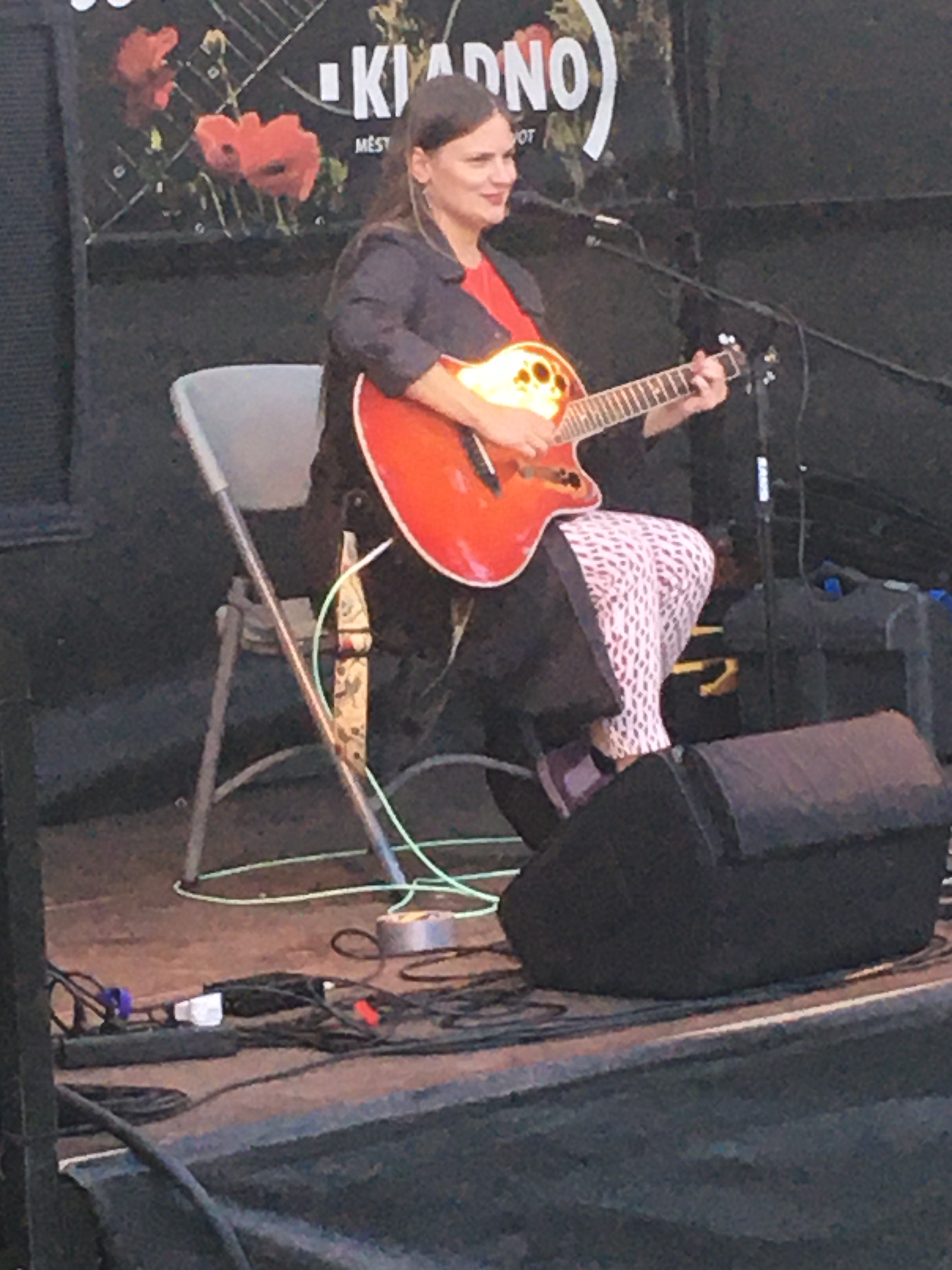 Vladivojna v zámecké zahradě